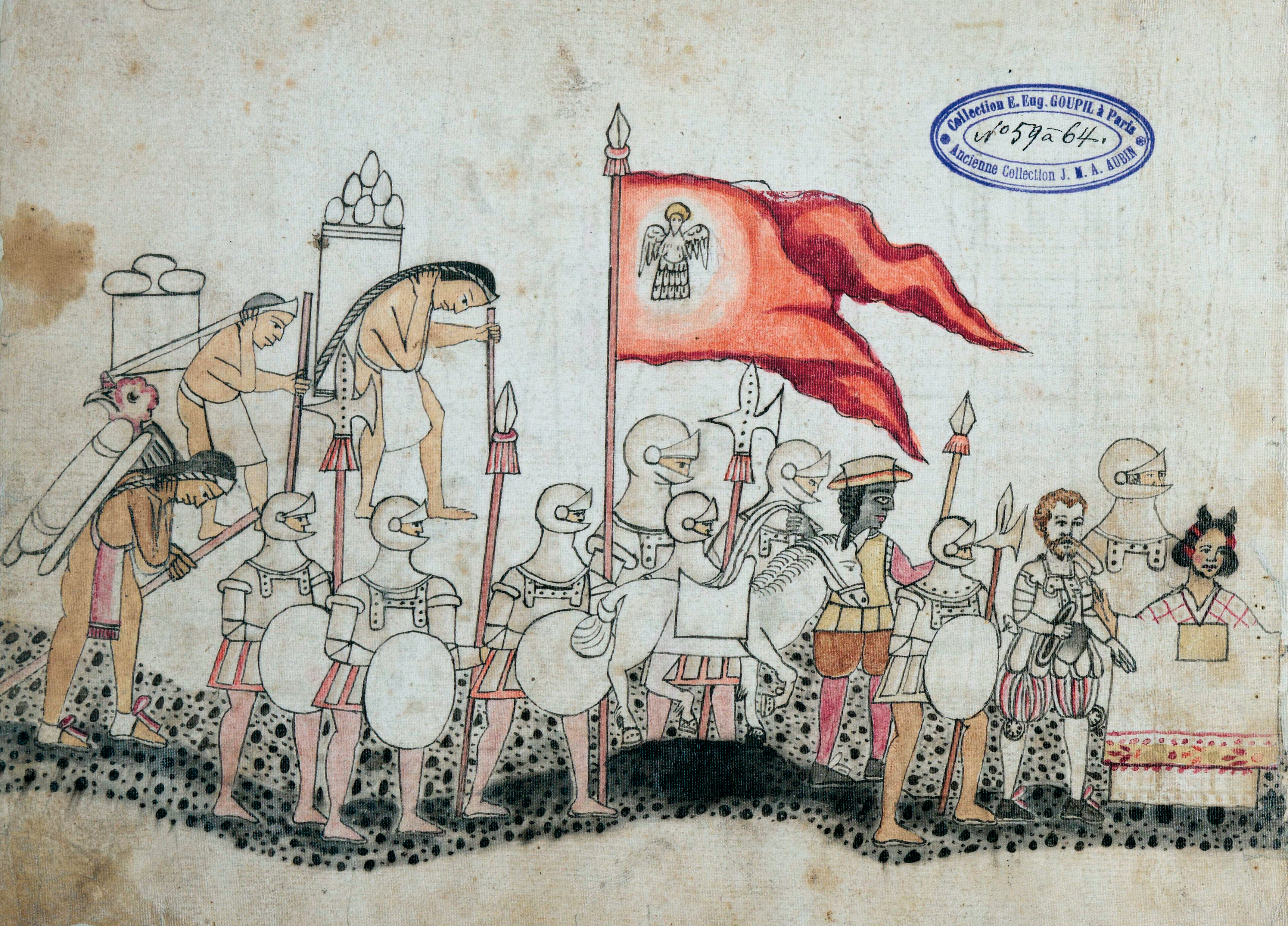 Codex page.